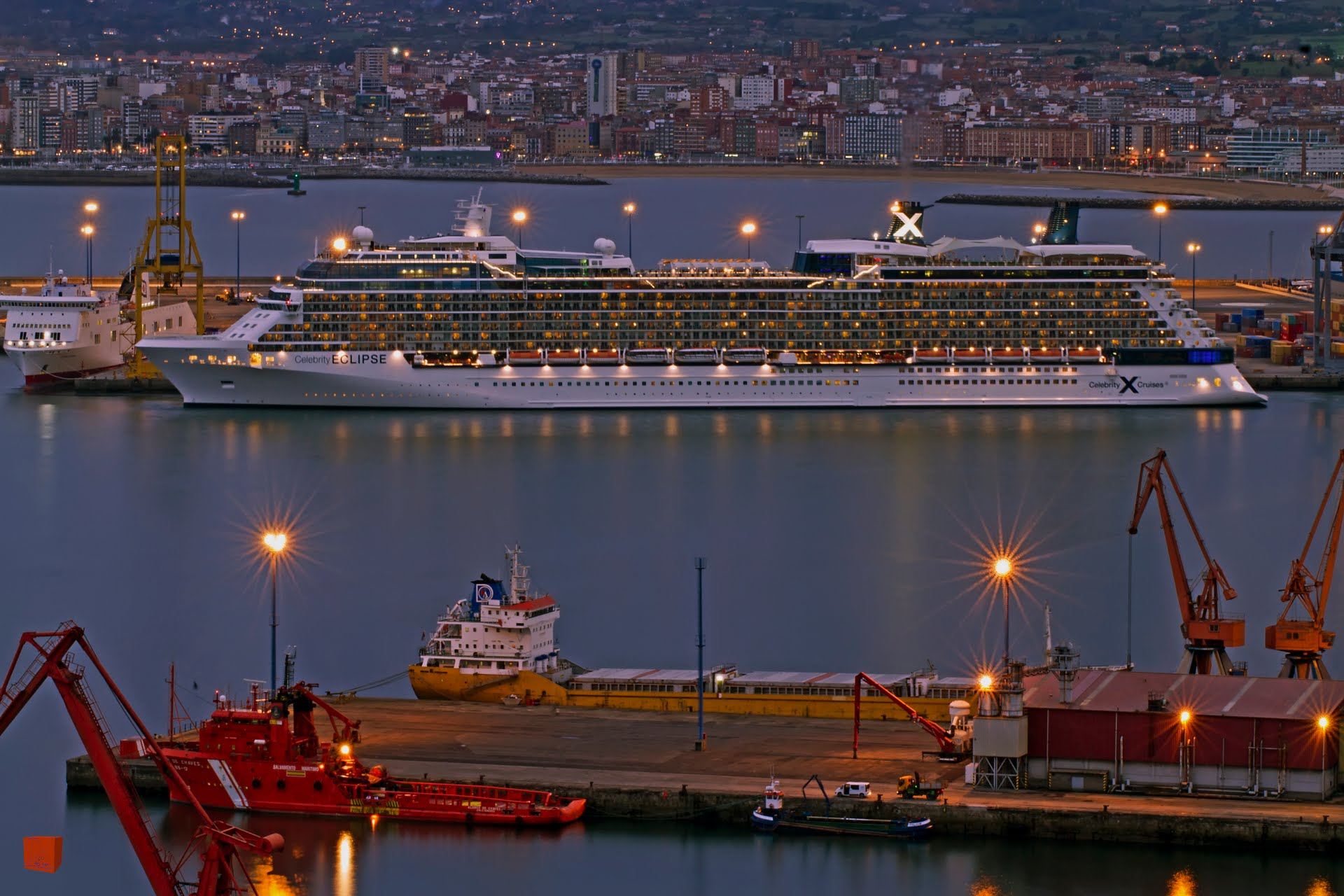 Anochecer en el puerto de El Musel (Gijón).